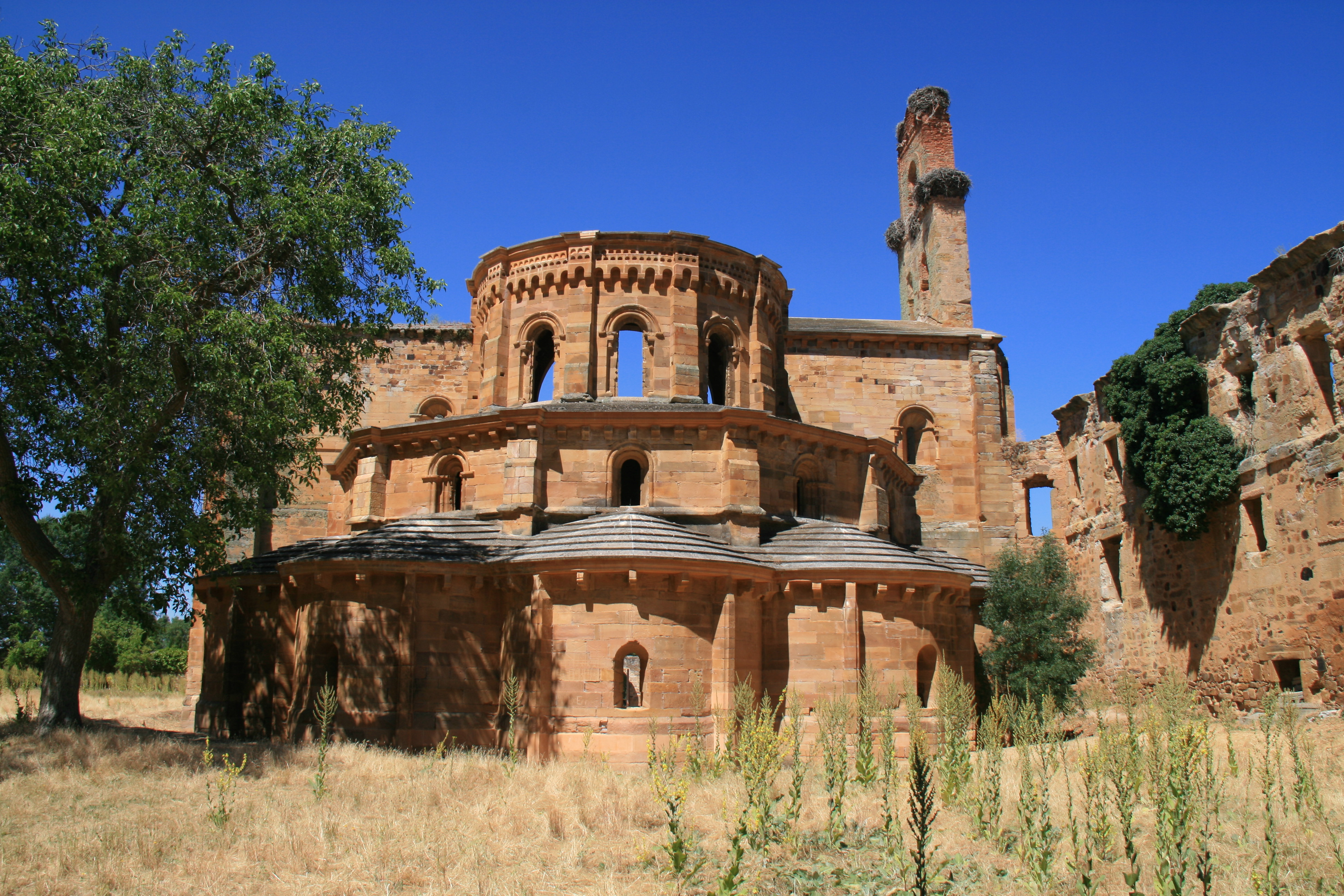 Exterior de Santa María de Moreruela (Zamora)